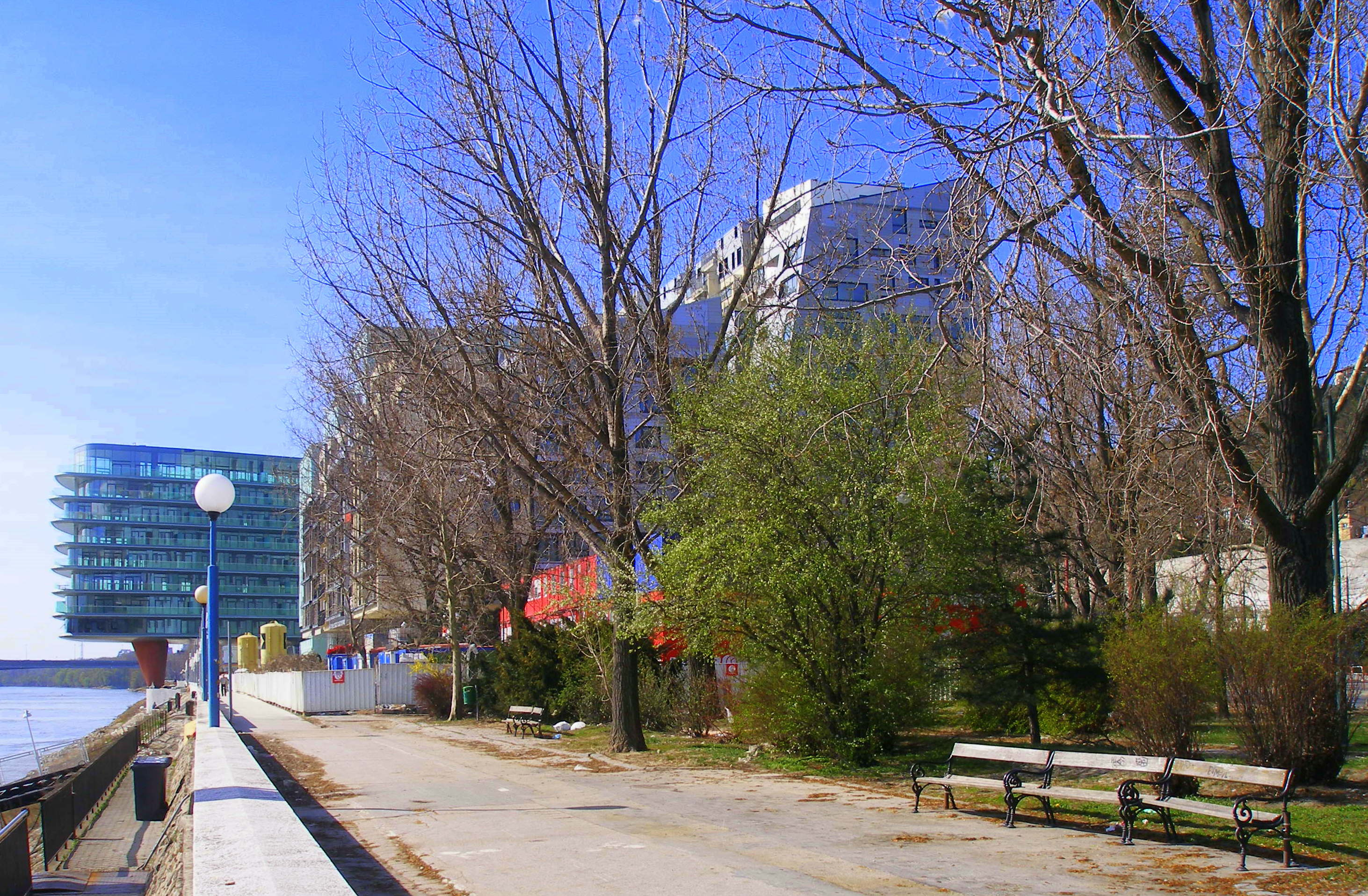 Bratislava Dvořákovo nábrežie.